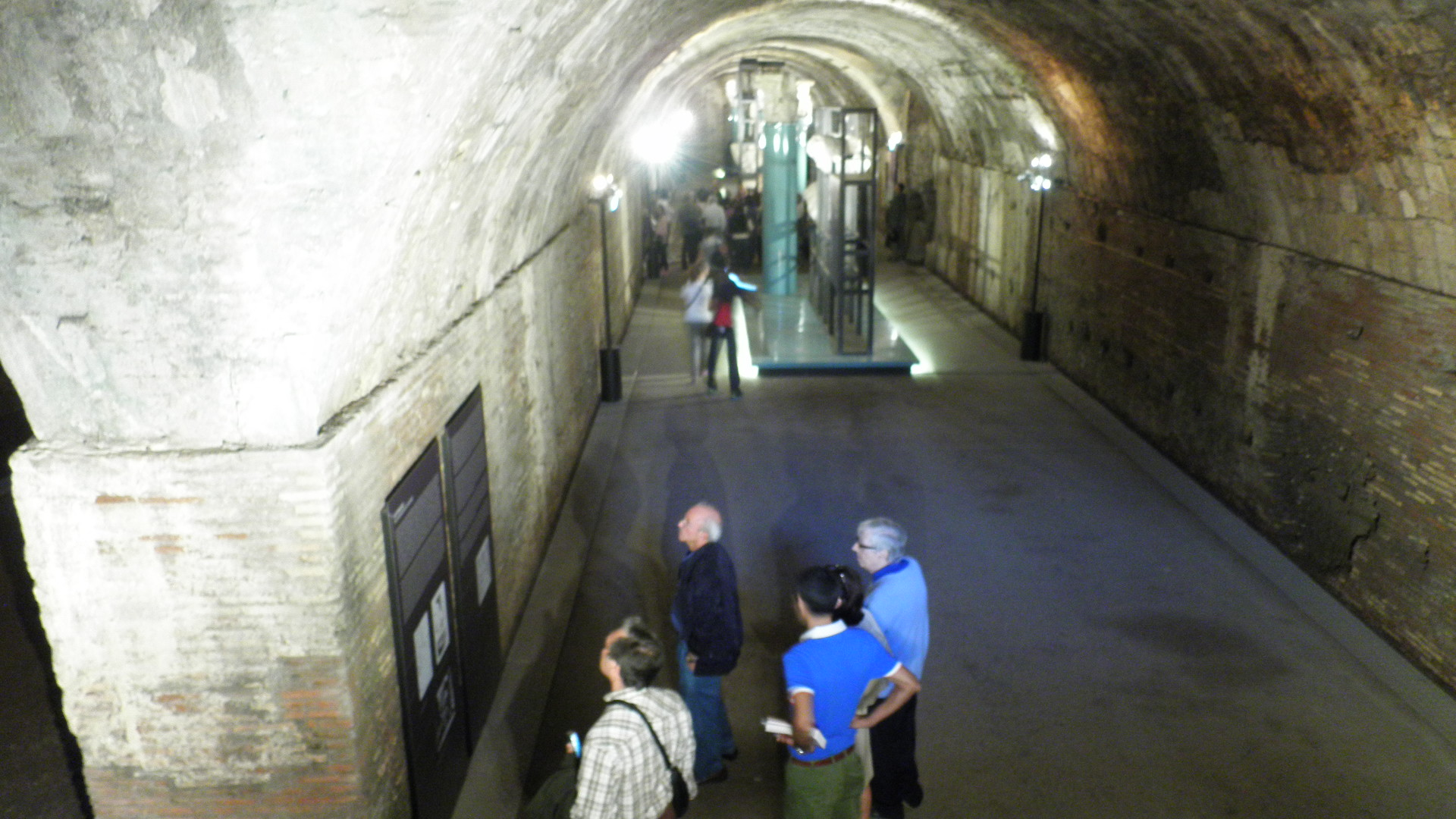 Roma, Terme di Caracalla. Ambienti di servizio sotterranei, liv. 1.